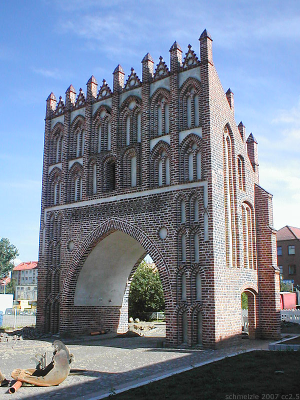 Kalensches Tor in Malchin, Mecklenburg-Vorpommern, Deutschland